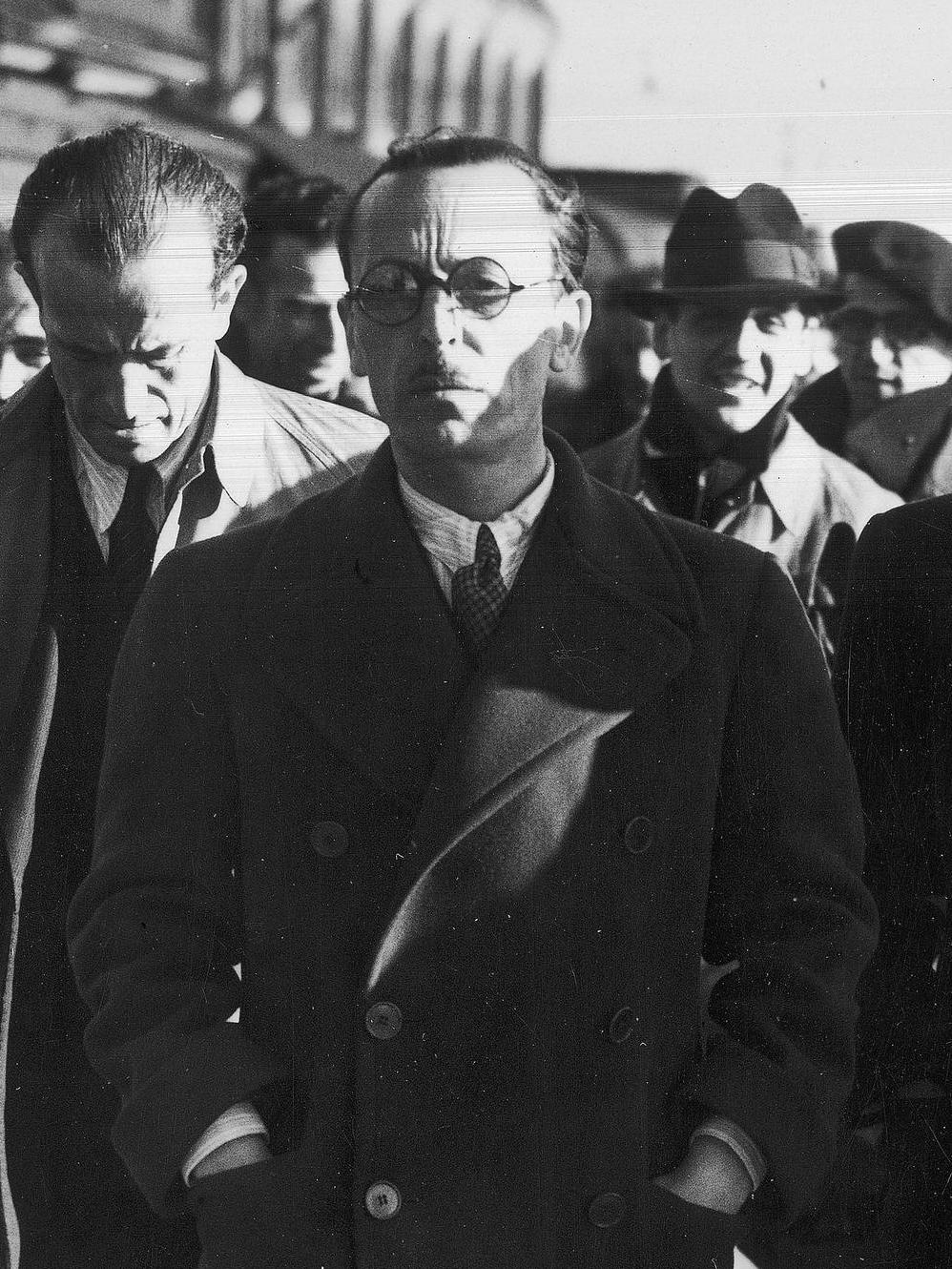 Członkowie Consejo Nacional de Defensa po przybyciu do Wielkiej Brytanii. Widoczni m.in. Segismundo Casado Lopez (w I rzędzie 1. z lewej) i Wenceslao Carrillo Alonso-Forjador (w I rzędzie w kapeluszu).